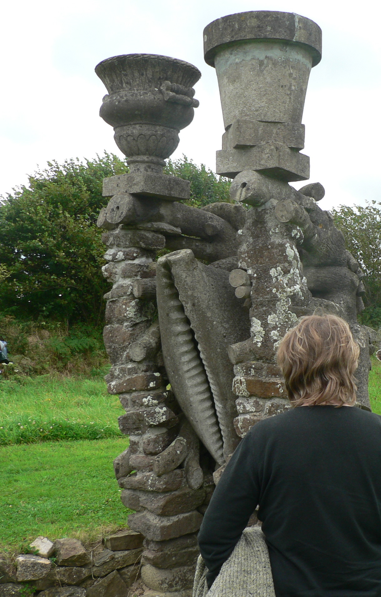 Sculpture faite par Auguste Letenneur: Fontaine à la virginité et allégorie de l'inégalité à la naissance